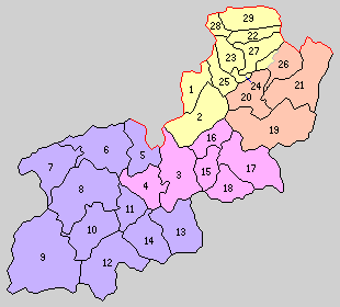 鳥取県日野郡の町村制時点の町村。